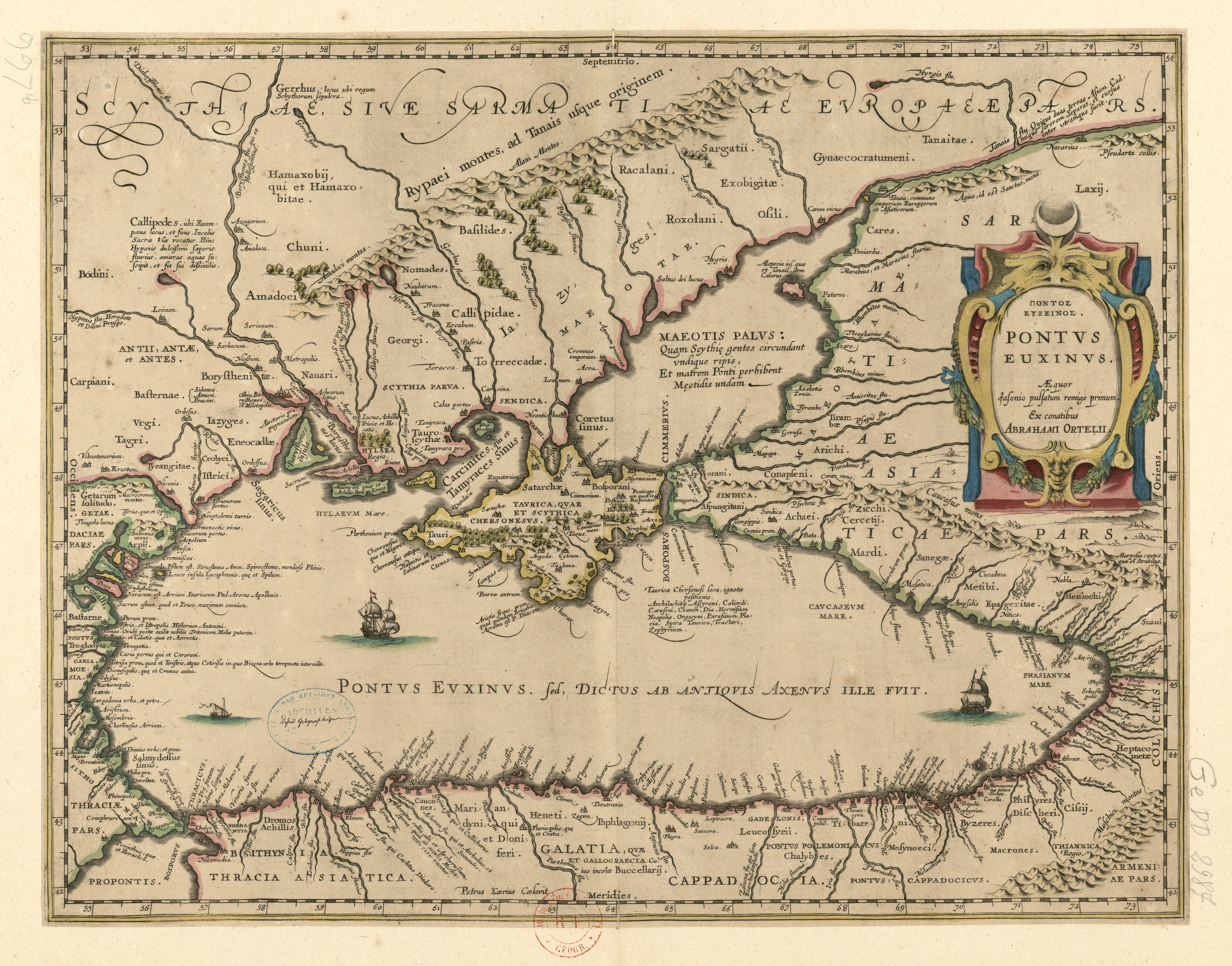 Pontus Euxinus / ex conatibus Abrahami Ortelii ; Petrus Caelavit